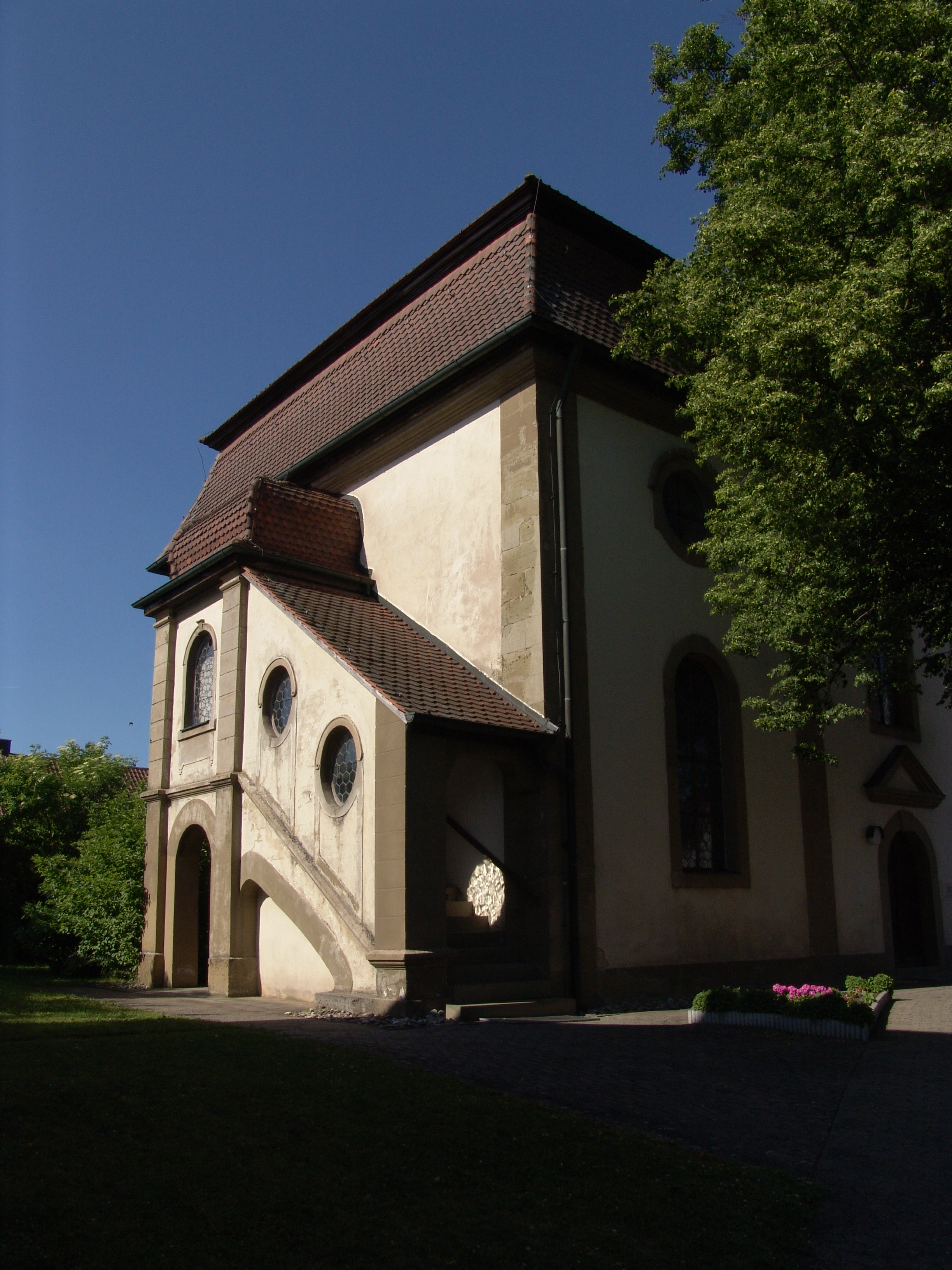 evang.-luth. Kirche St. Katherina in Schauernheim